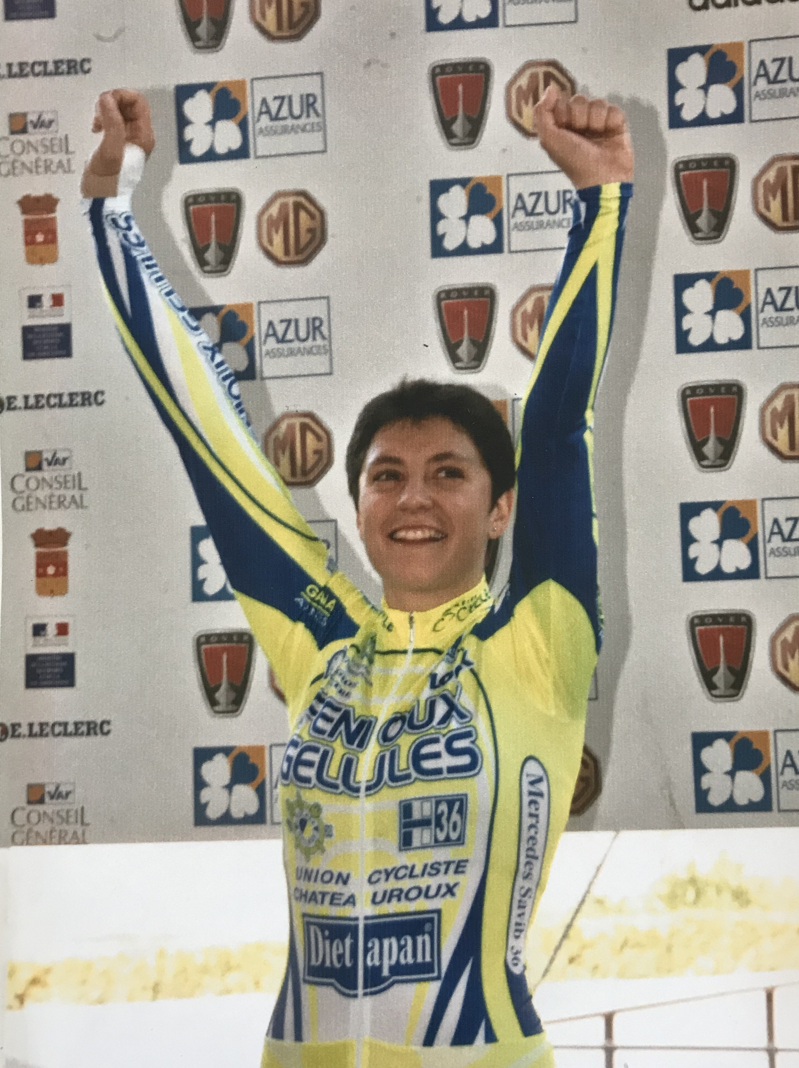 Podium France